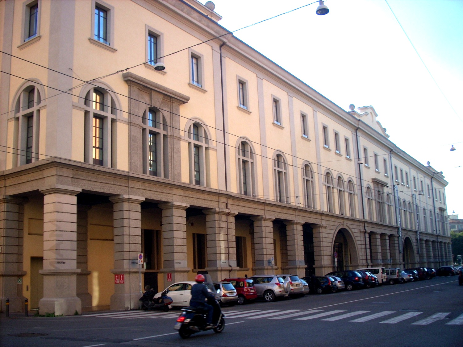 Museo d'Arte Moderna di Bologna